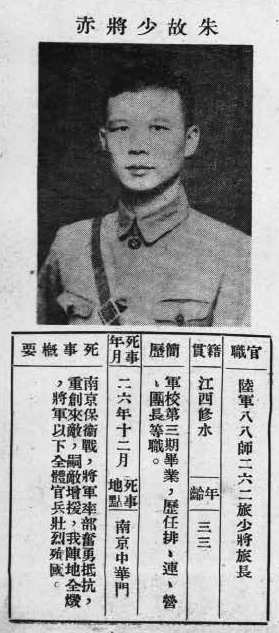 中文（台灣）: 抗戰軍人忠烈錄第一輯中的烈士遺像